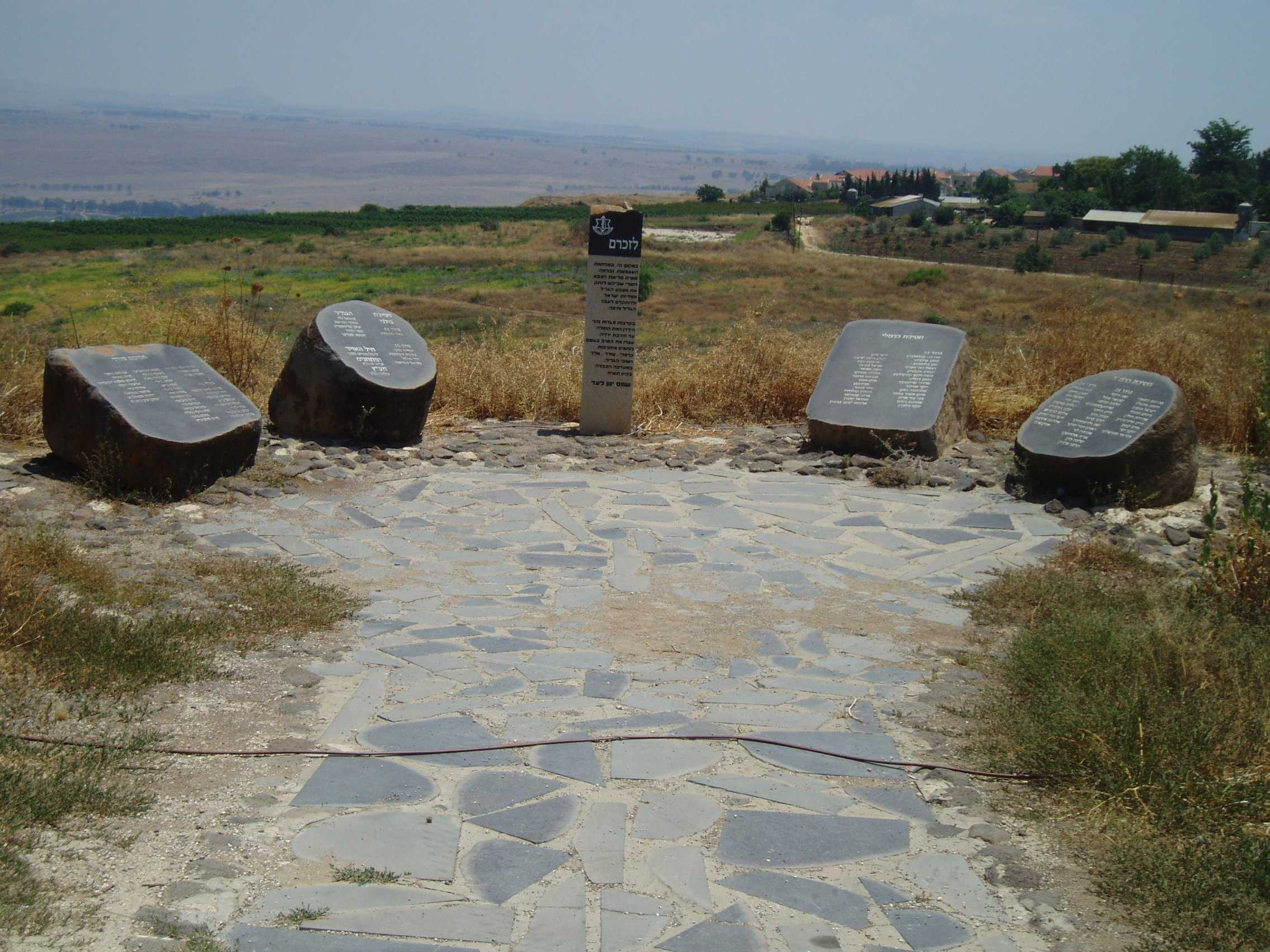 Monument at Yarda